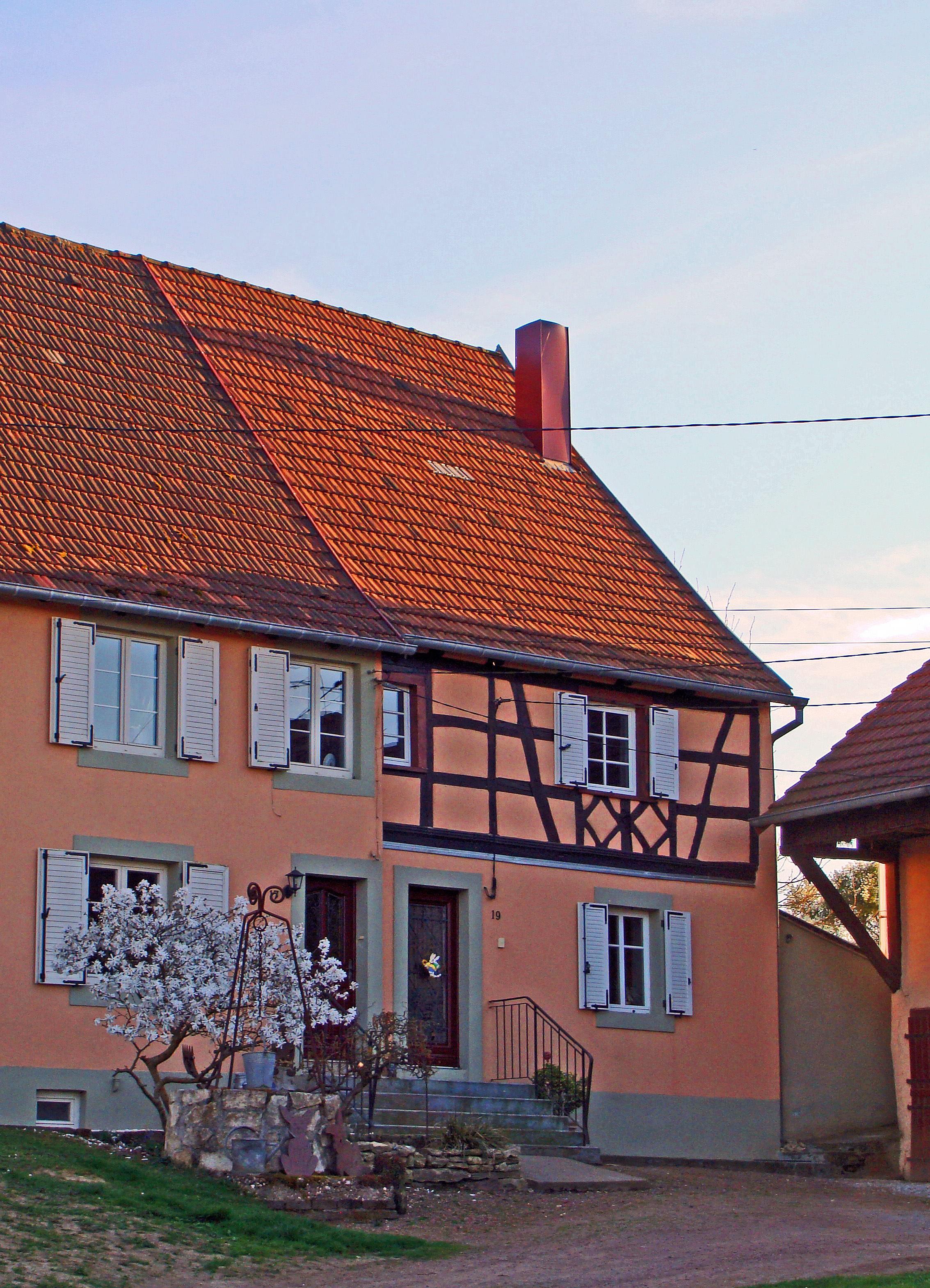 Ancienne maison à colombages de Kappelkinger (Moselle)